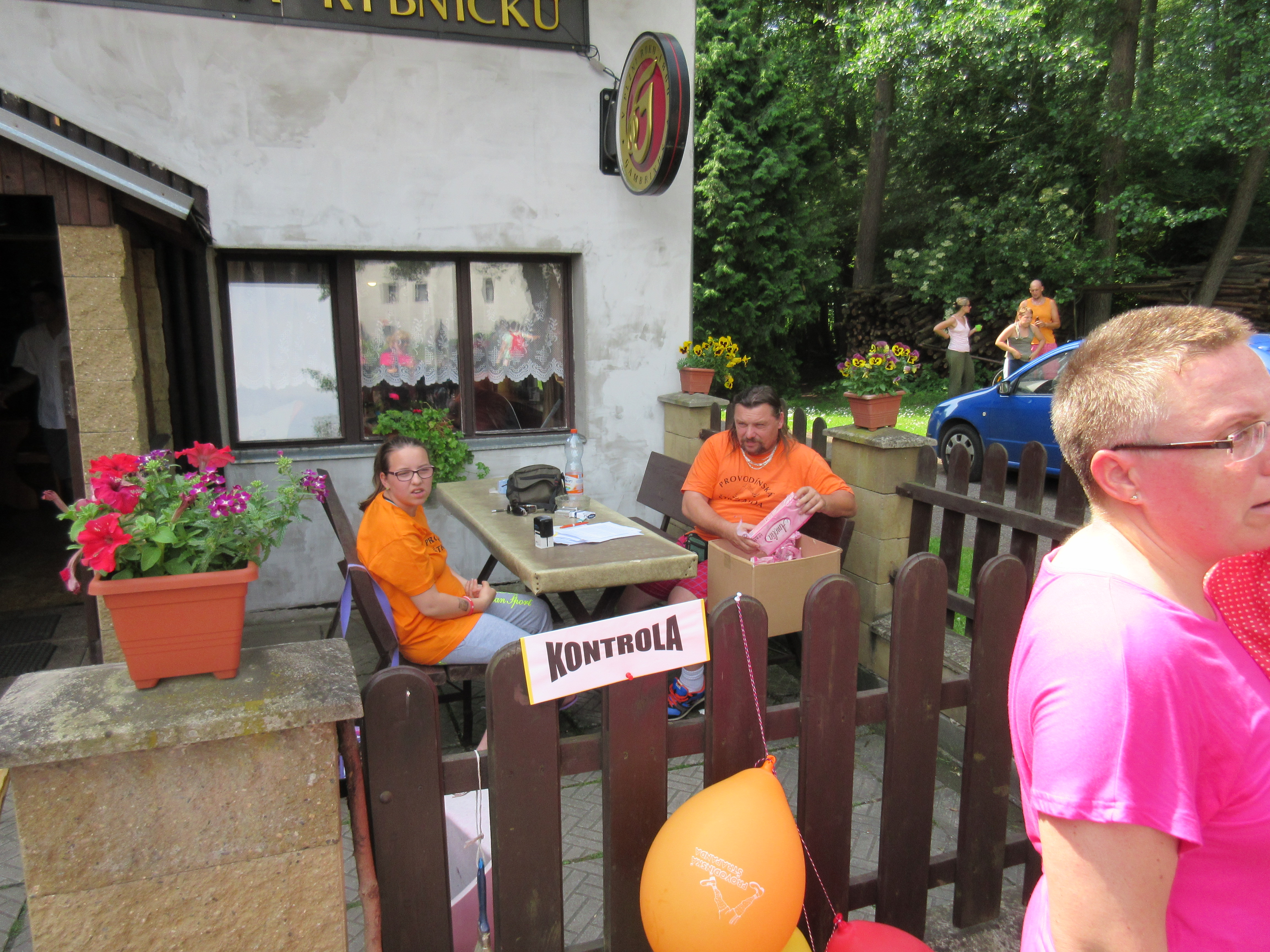 Kontrola pochodu ve Starých Splavech